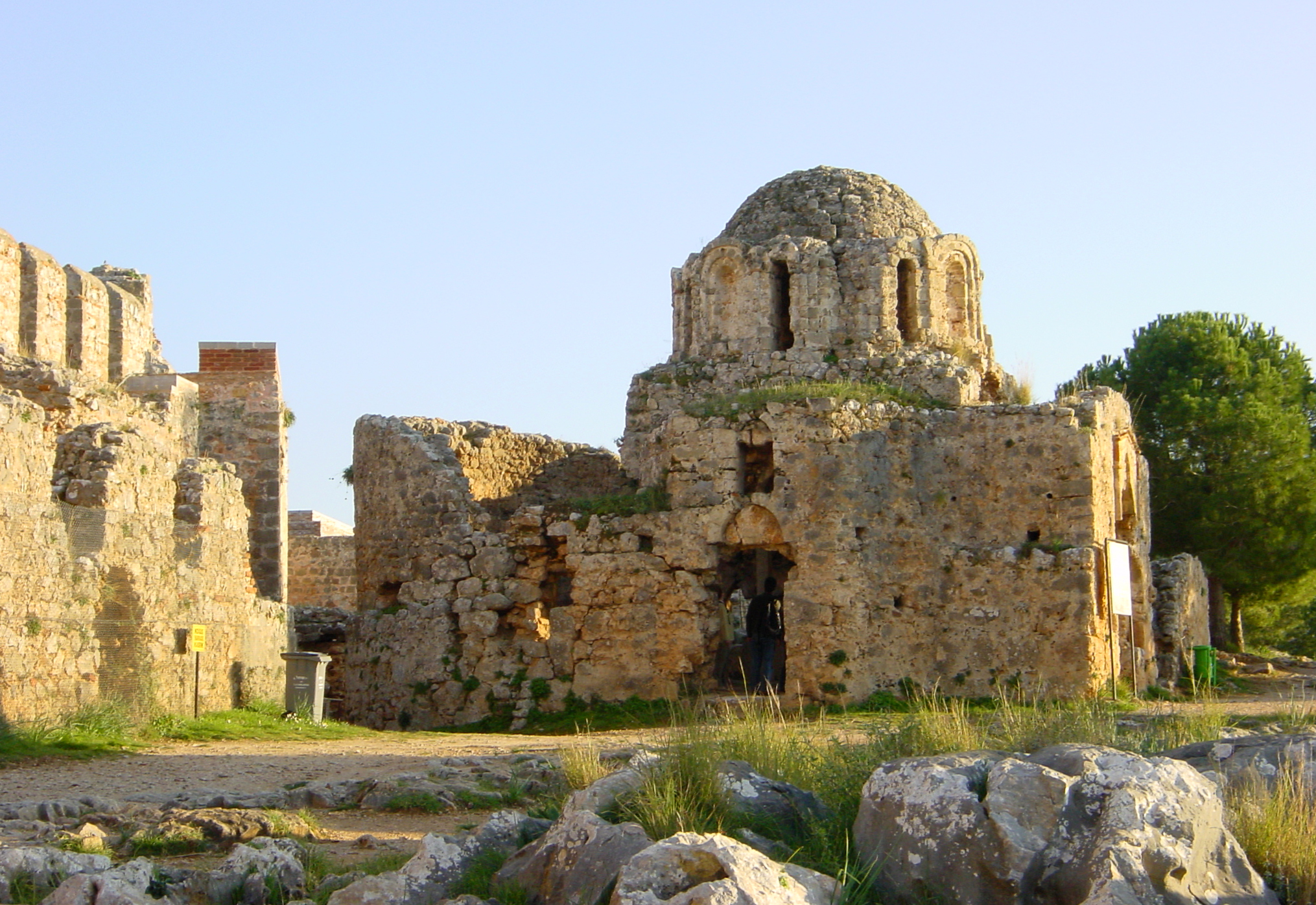 2003-12-28 01-04 T�rkei 048 Alanya Burgberg